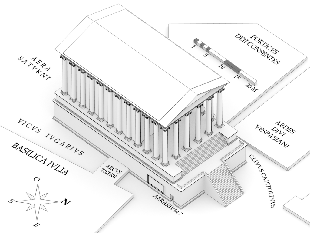 Restitution du temple de Saturne D'après : - Richardson, The Approach to the Temple of Saturn in Rome, AJA, 1980 - Pensabene, Tempio di Saturno, 1984 - Richardson, A New Topographical Dictionary of Ancient Rome, 1992 - Stamper, The architecture of roman temples, 2005 Perspective isométrique Voir aussi